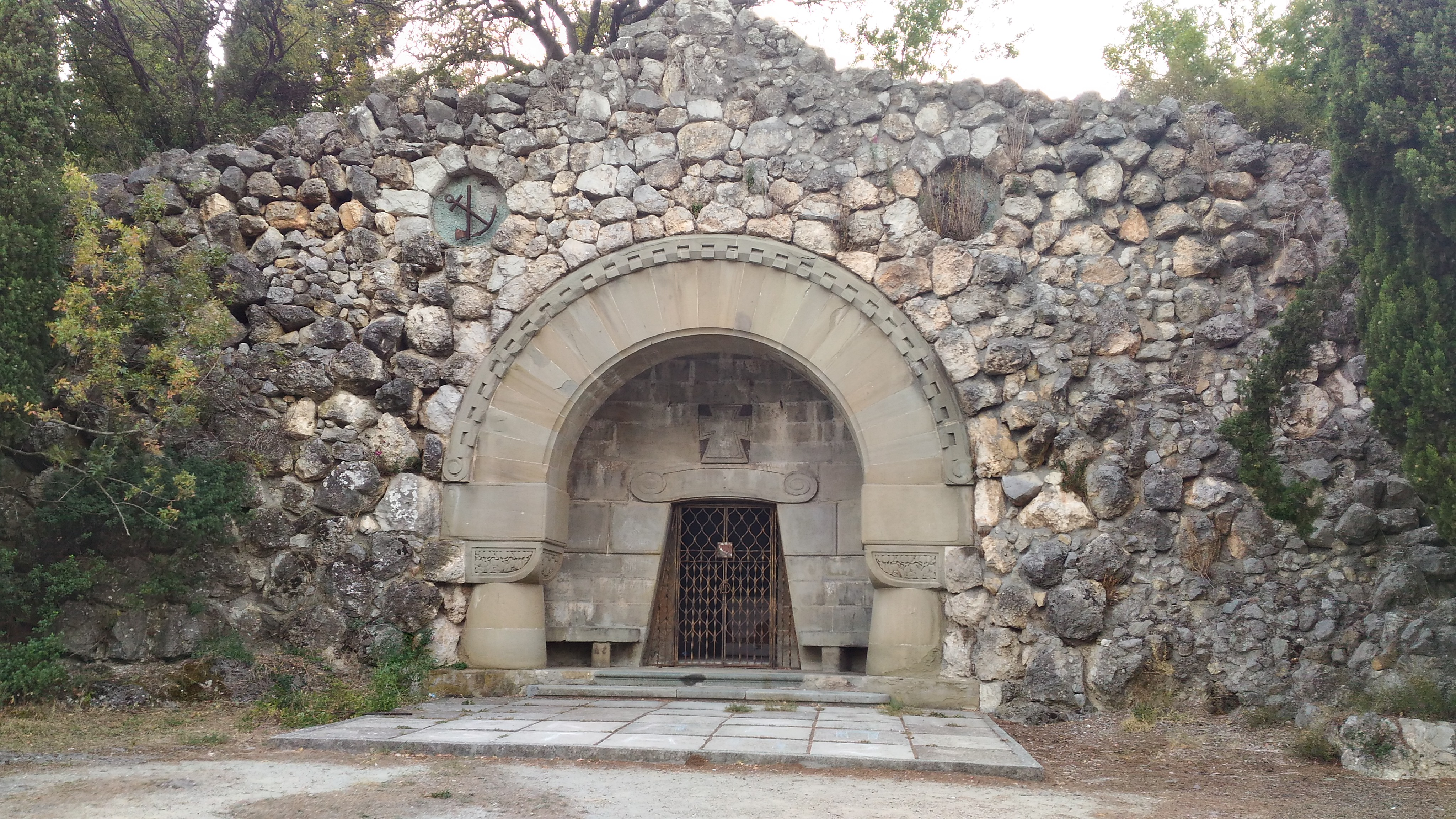 Склеп Березиных-Соловьевых: улица Ленинградская, территория лагеря "Лазурный" МДЦ "Артек", Гурзуф, Ялта, Крым This object is located on the Crimean Peninsula and recognized as cultural heritage by Russia under the monument ID: 8231801000. The legal status of the Crimean region is currently disputed.